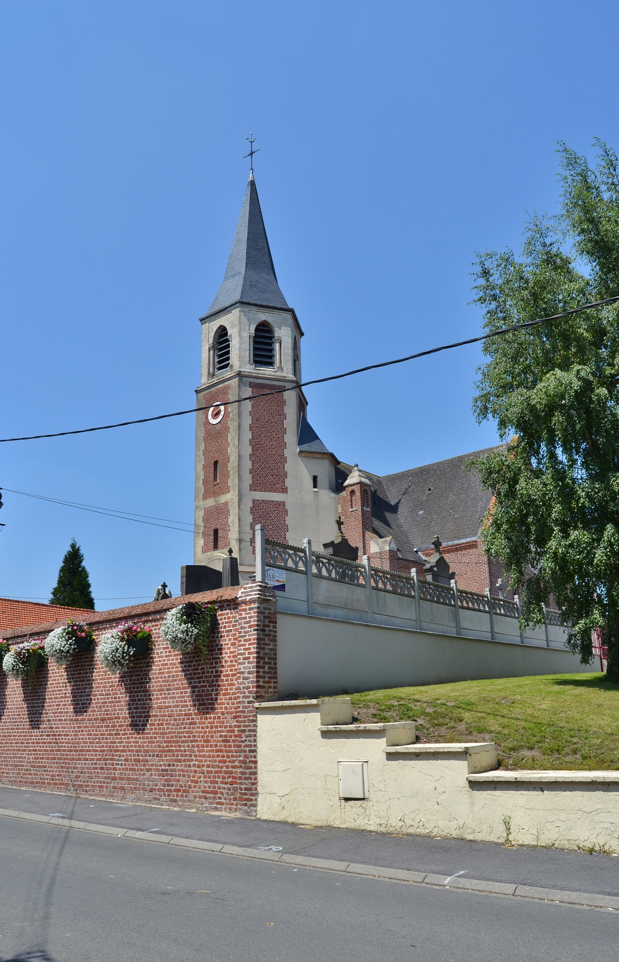 église St Georges